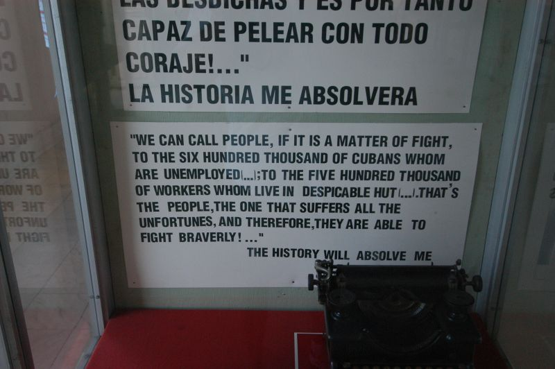 Cuba, sept 2005, info in de Metadata